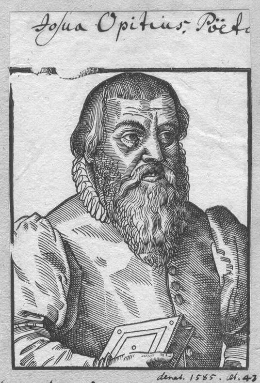 Josua Opitz (1542-1585), deutscher lutherischer (flacianischer) Theologe und Pädagoge; zeitgenössischer Holzschnitt